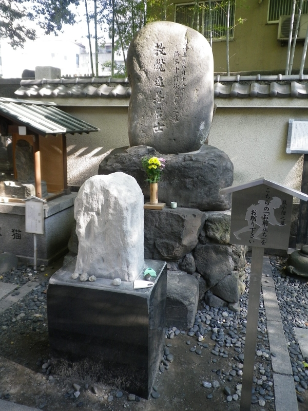 鼠小僧の墓